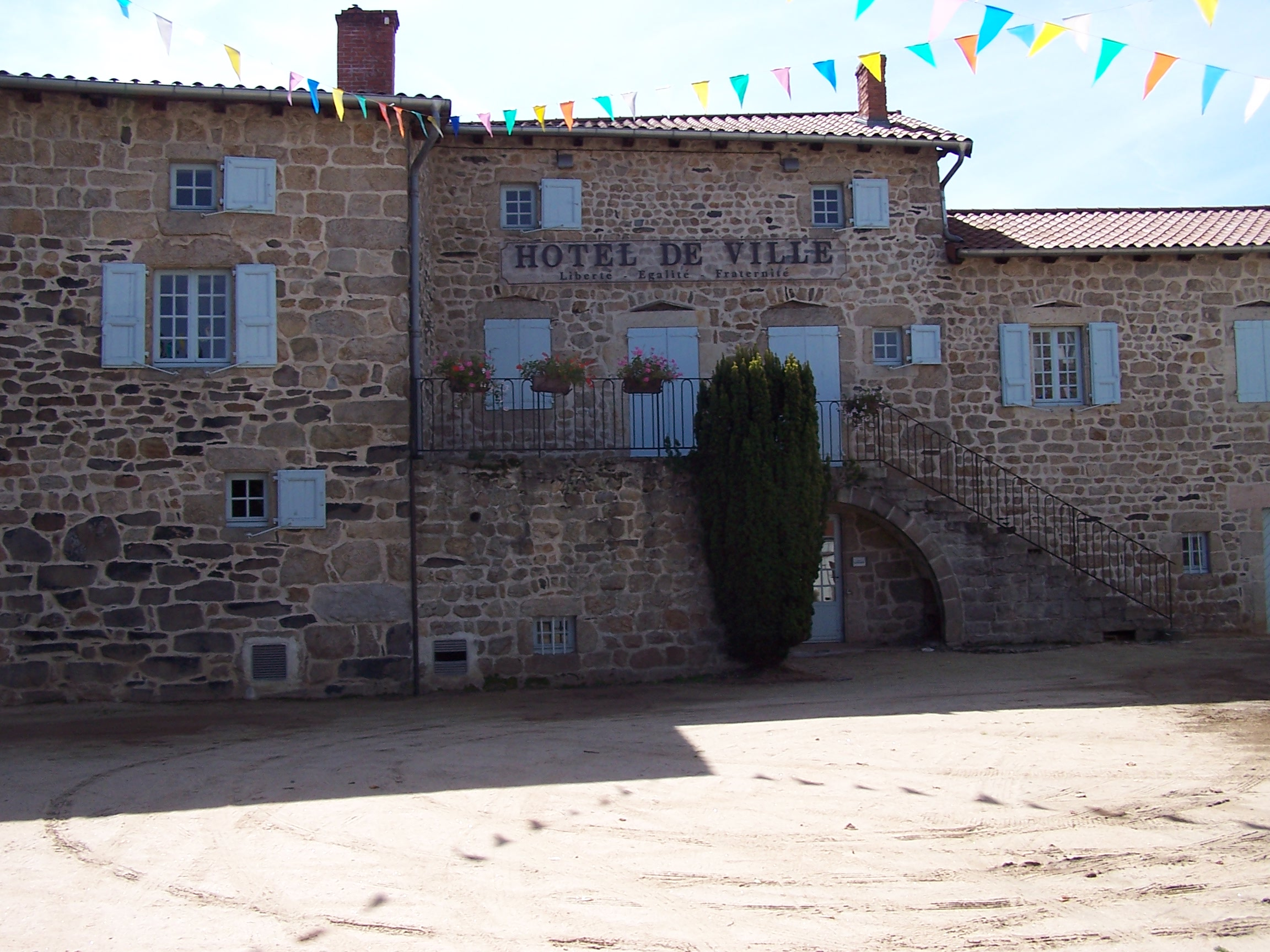 Hôtel de ville de Saint-Maurice-de-Lignon en Haute-Loire, France.